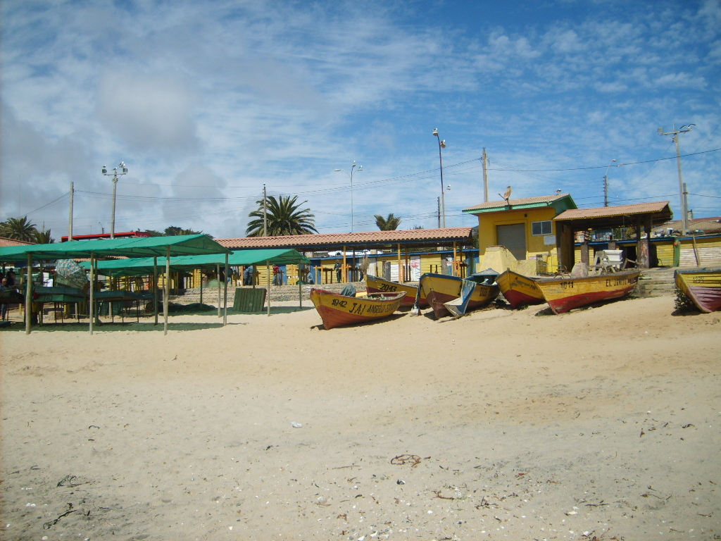 Caleta de pescadores de El Quisco, ubicada a un costado del muelle.